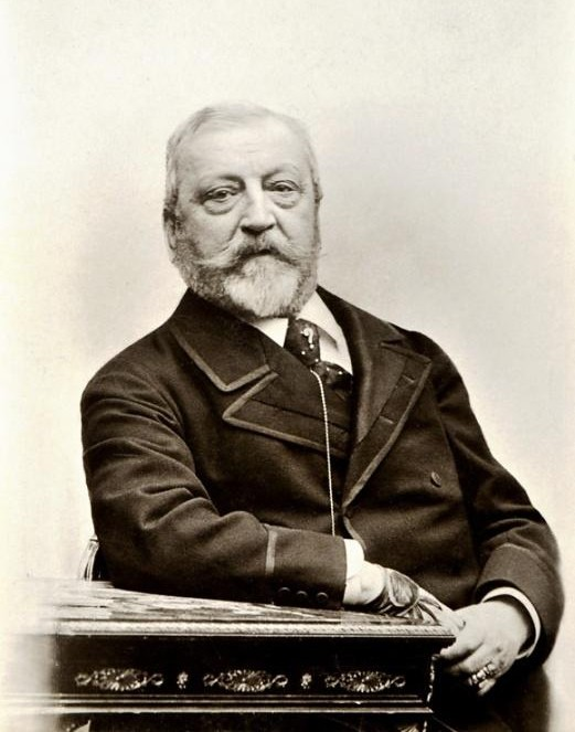 Quido Dubský z Třebomyslic (1835 - 1907), Rakouský a moravský šlechtic a politik.